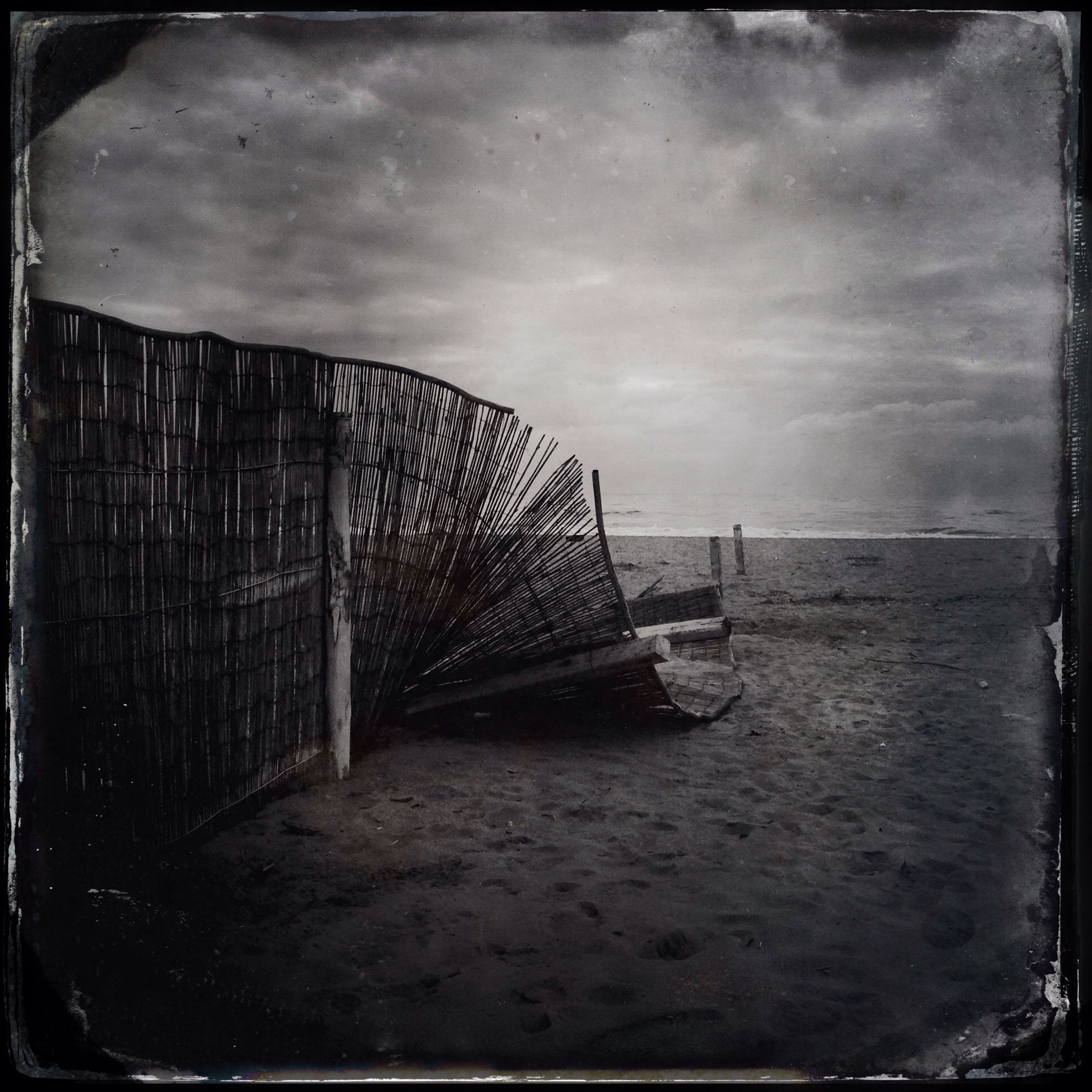 Dune di Forte dei Marmi This is a photo of a monument which is part of cultural heritage of Italy. The authorisation for taking photos of this object was provided by the World Wide Fund for Nature Italy.